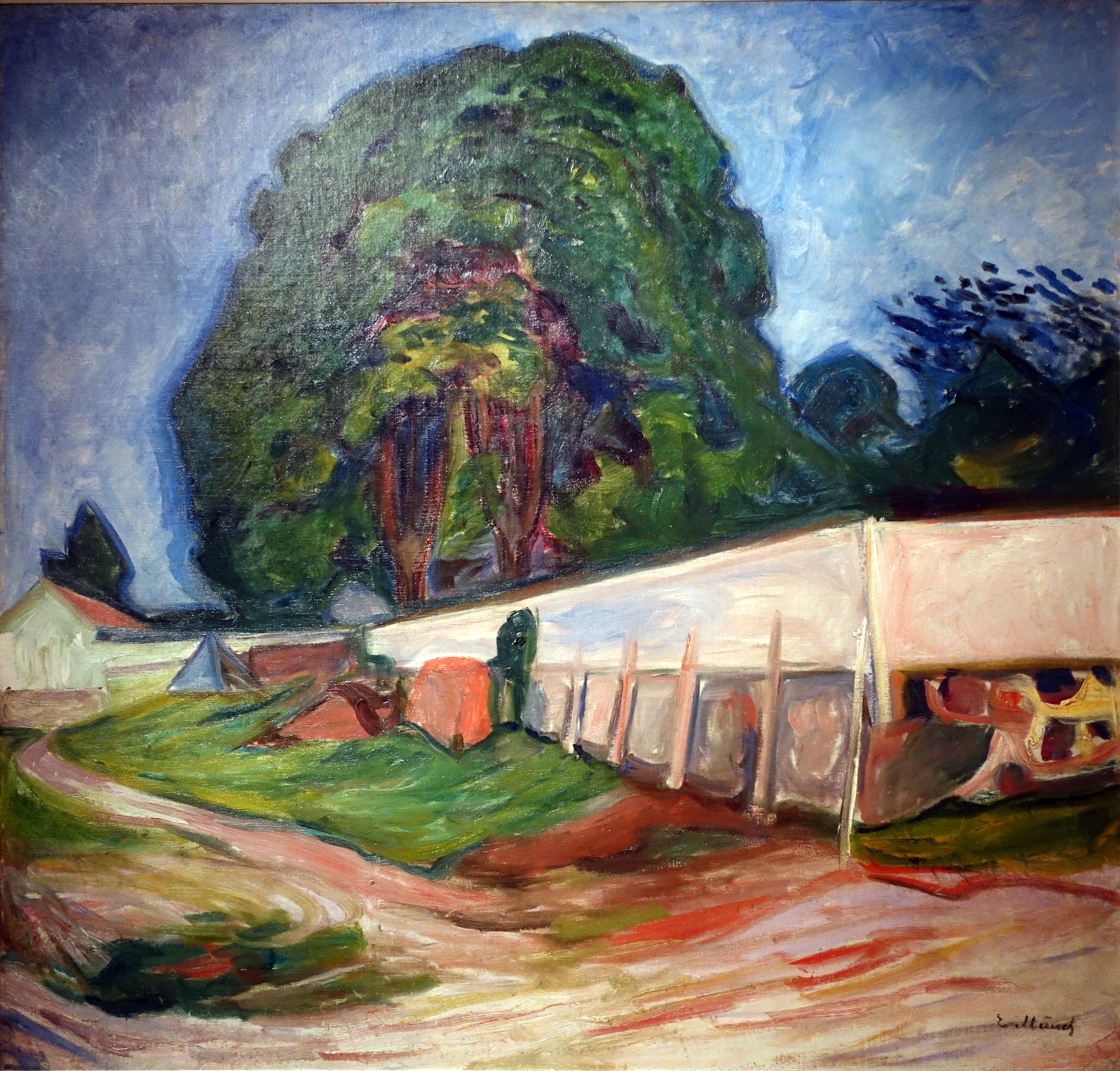 1904 - Huile sur toile - Musée d'Orsay